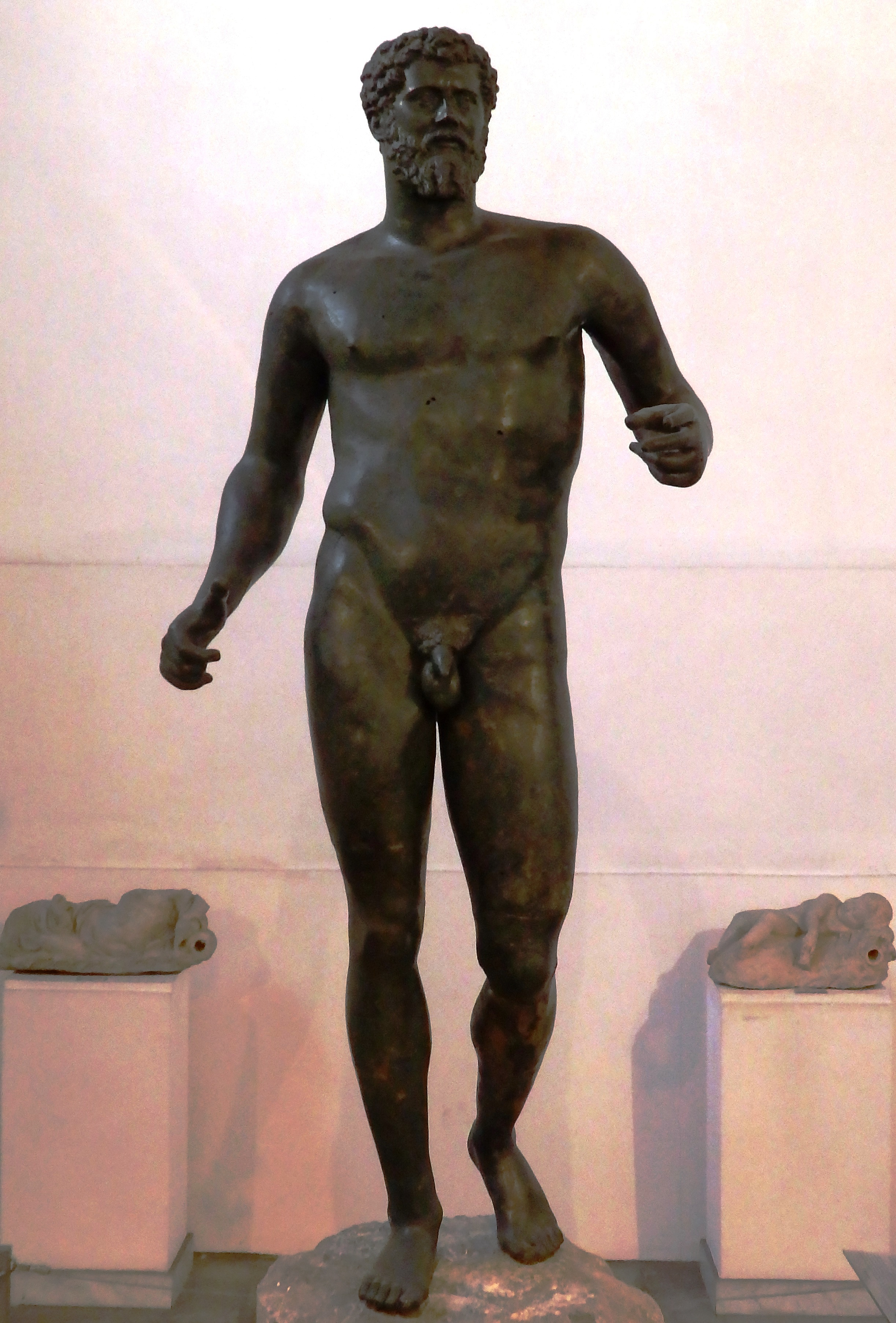 Bronzestatue Septimius Severus, Zypernmuseum, Nikosia